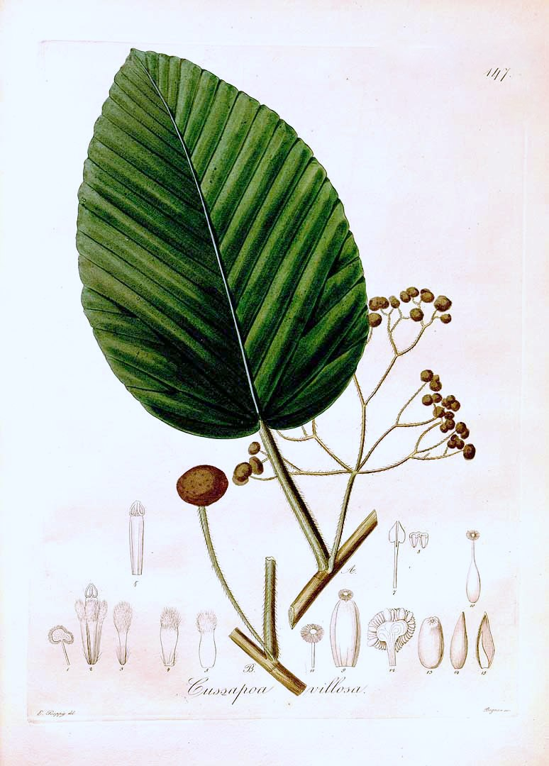 Coussapoa villosa - 1-8) Inflorescencia y flor mascúlina y sus componentes; 9-12) Inflorescencia y flor femenina y sus componentes; 13-15) Fruto y semilla.